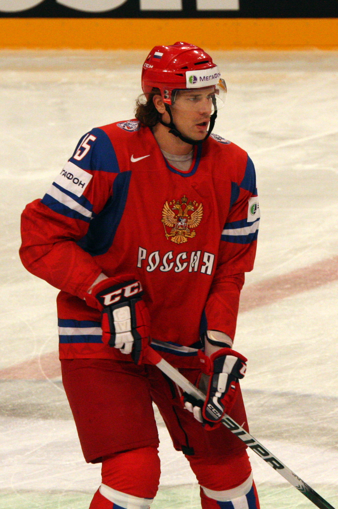 Александр Свитов, разминка перед матчем Россия-Швеция, 11.05.2012, Стокгольм, Швеция